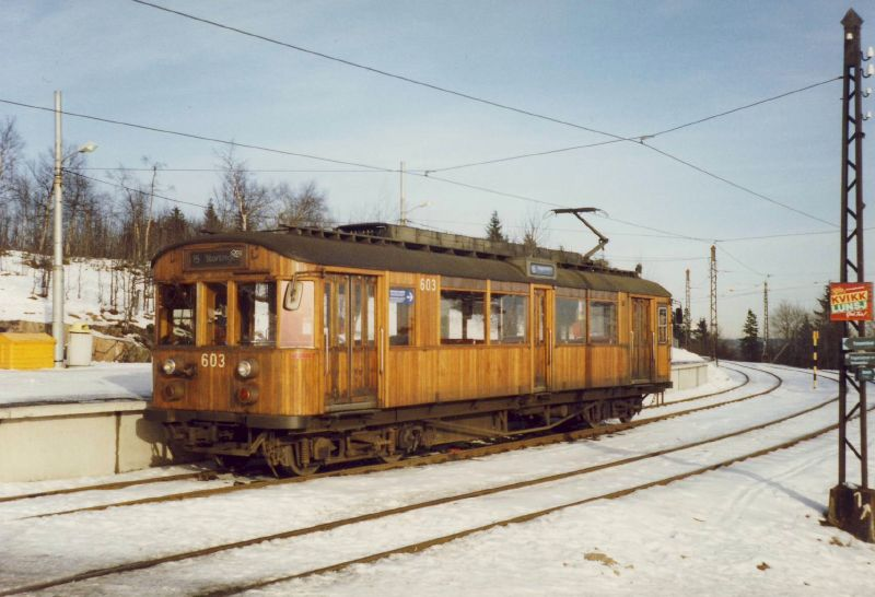 Holmenkollbanen Series 600 tram no. 603 on the Holmenkollen Line